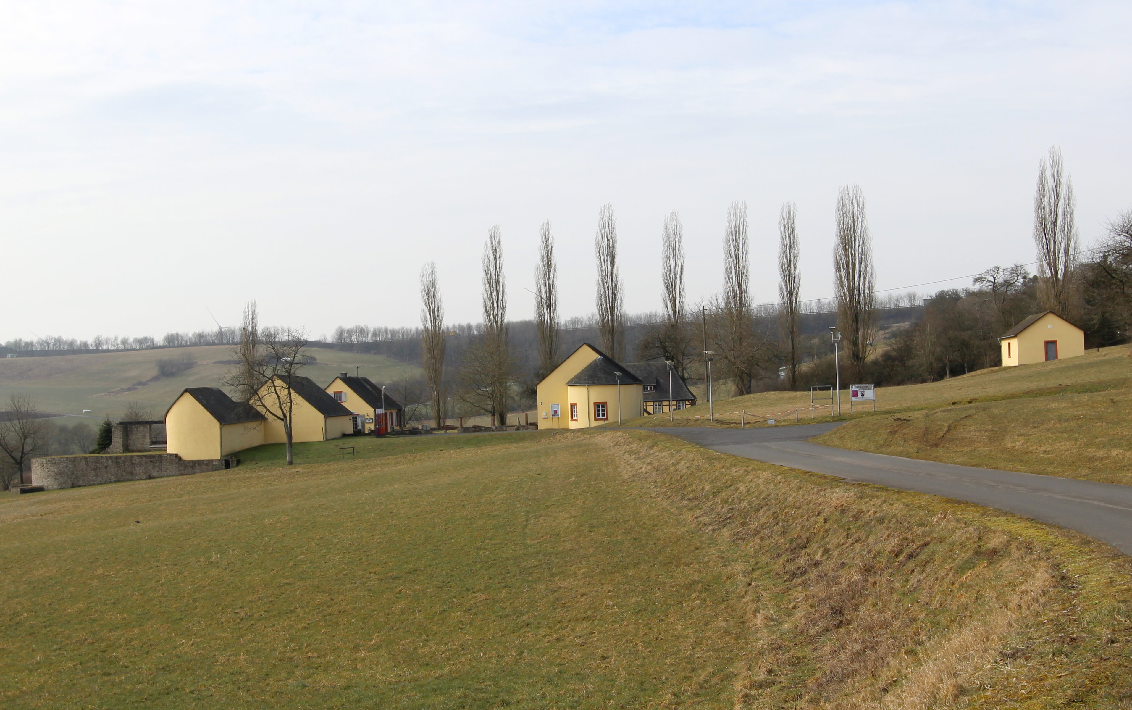 54636 Fließem, Otranger Straße. Die Villa Otrang ist eine der größten und am besten erhaltenen römischen Villenanlage nördlich der Alpen. Erbaut um das 1. Jhd. n. Chr., erstreckte sich die Anlage über ein Areal von ca. 379 Metern Länge und 132 Metern Breite. Zu besichtigen ist das prunkvoll ausgestattete Landgut mit zahlreichen Mosaikfußböden. Aufnahme von 2018.